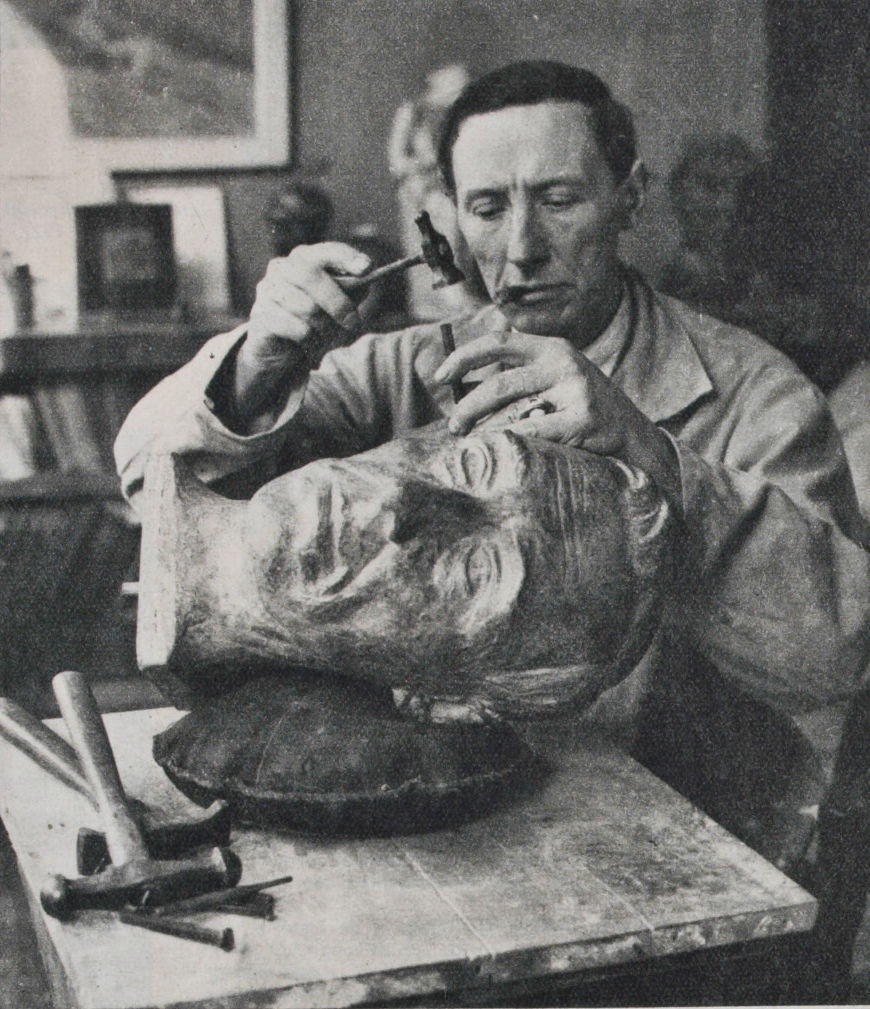 Portret van Cris Agterberg, afkomstig uit: Utrecht in woord en beeld, 1938/39, nr. 38.